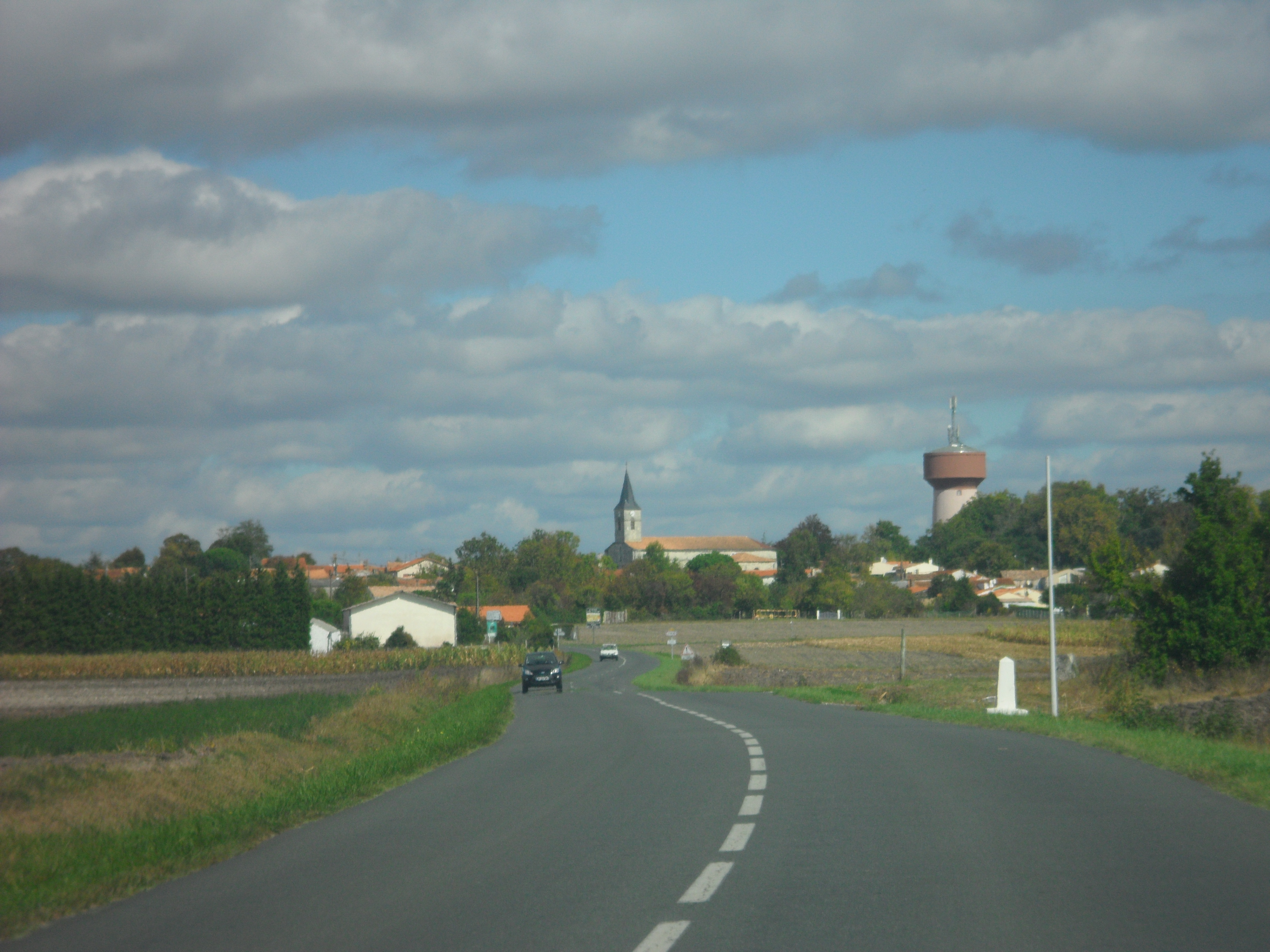 Vue de la commune d'Arvert